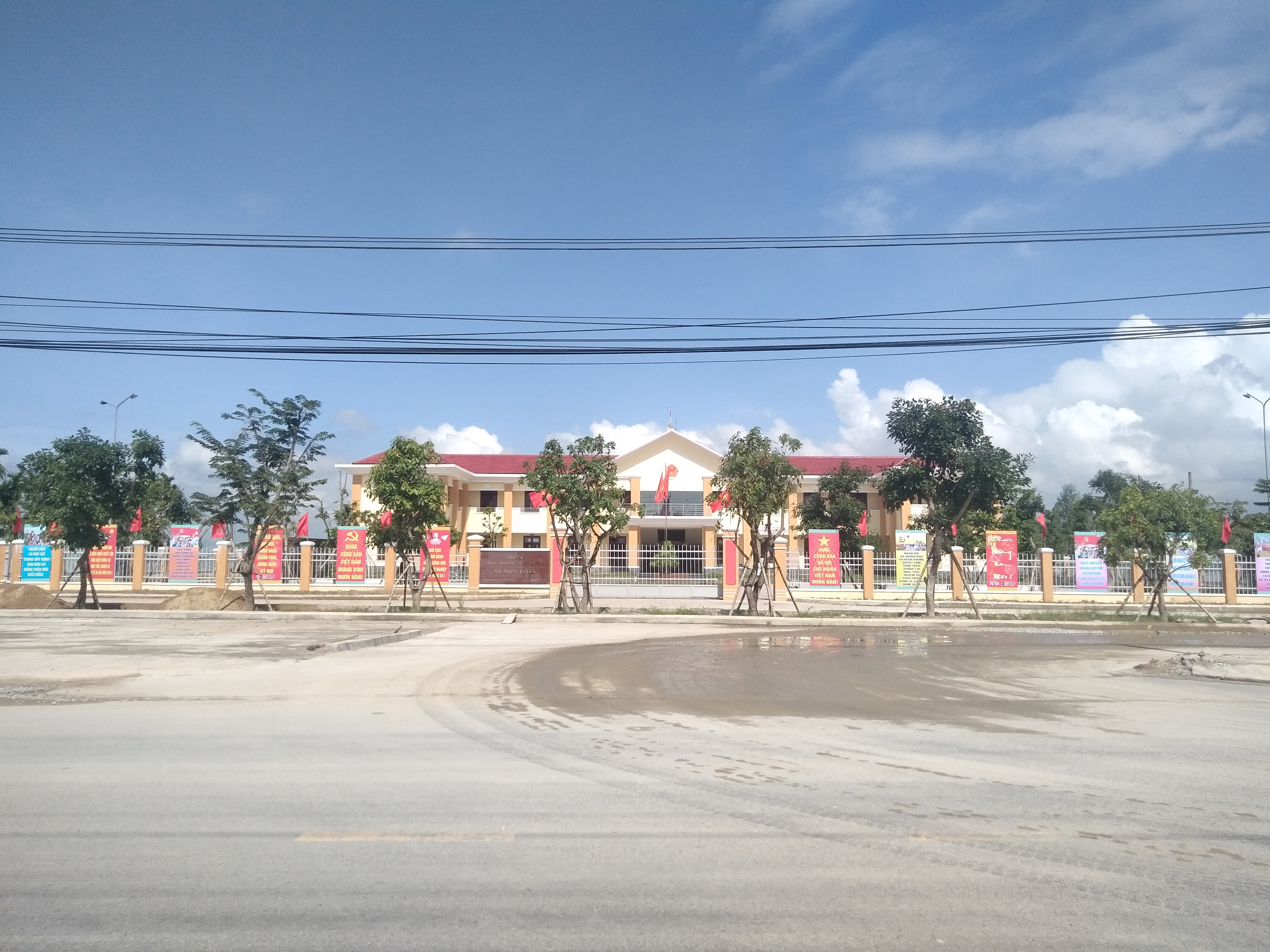 UBND xã Điện Phước, Điện Bàn, Quảng Nam